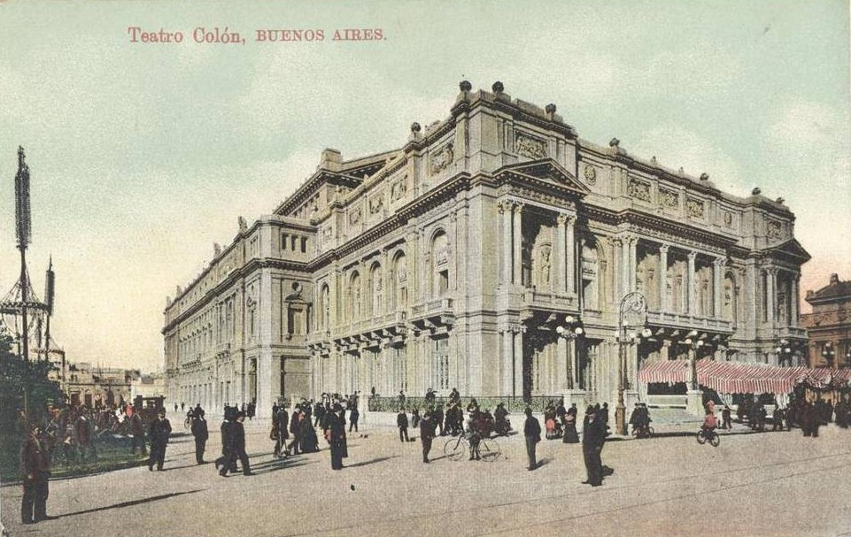 Foto del Teatro Colón de Buenos Aires, en su primer año de existencia, probablemente tomada en su inauguración, el 25 de Mayo de 1908.